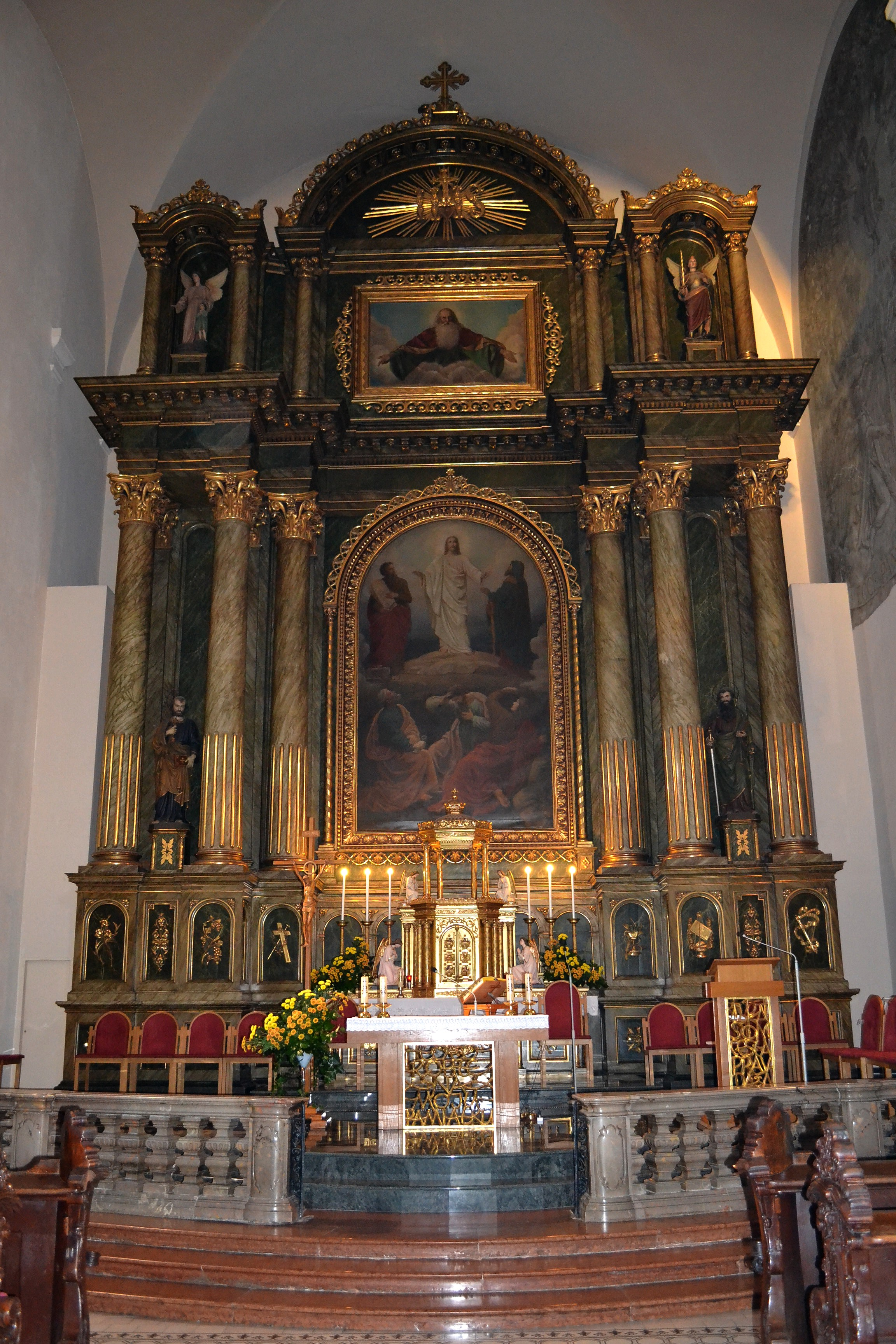 Hlavný oltár Kostola Najsvätejšieho Spasiteľa